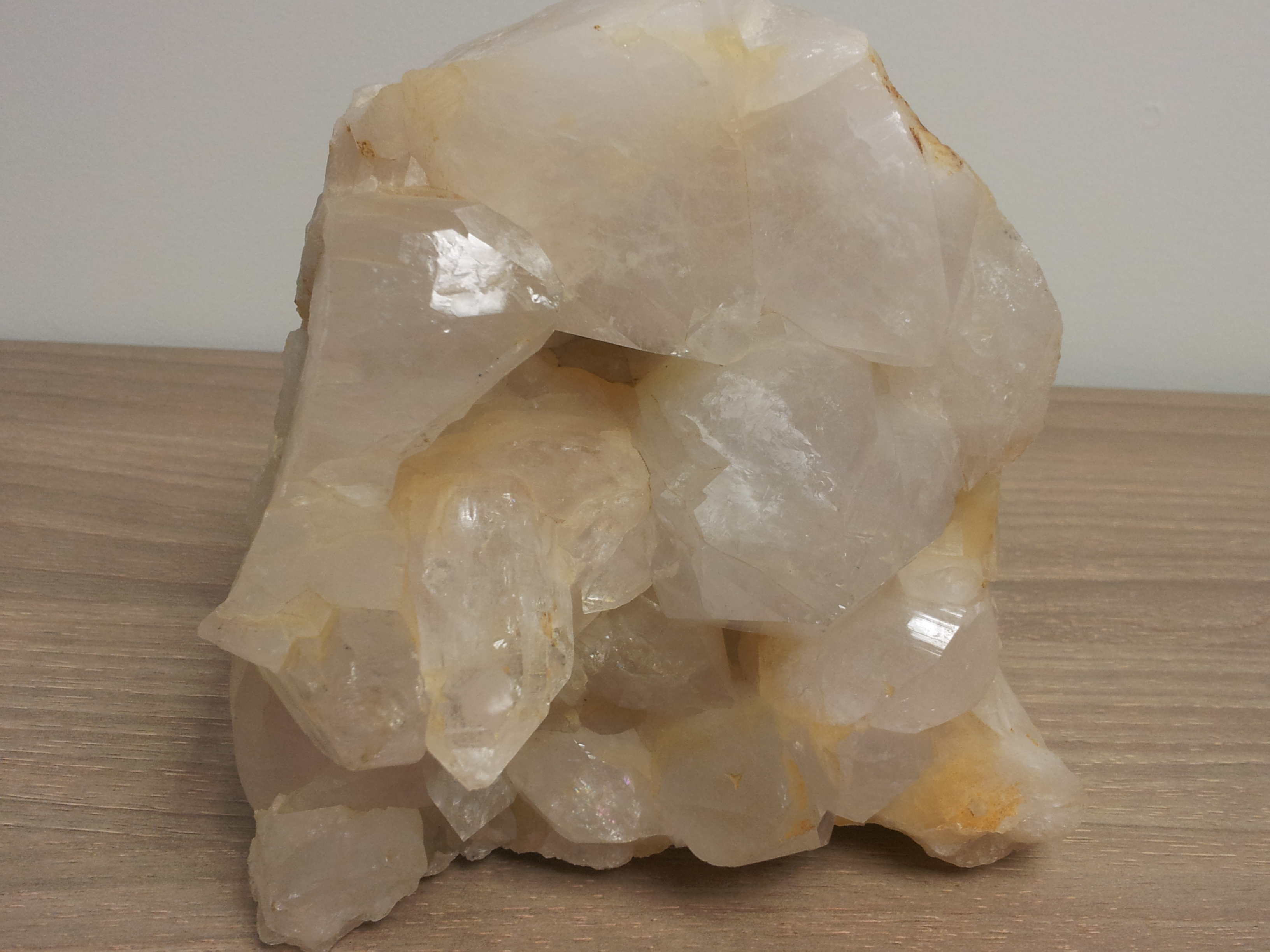 קוורץ גולמי